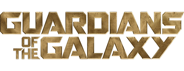 Logo von dem Film Guardians of the Galaxy (2014) Logo of the movie Guardians of the Galaxy (2014)